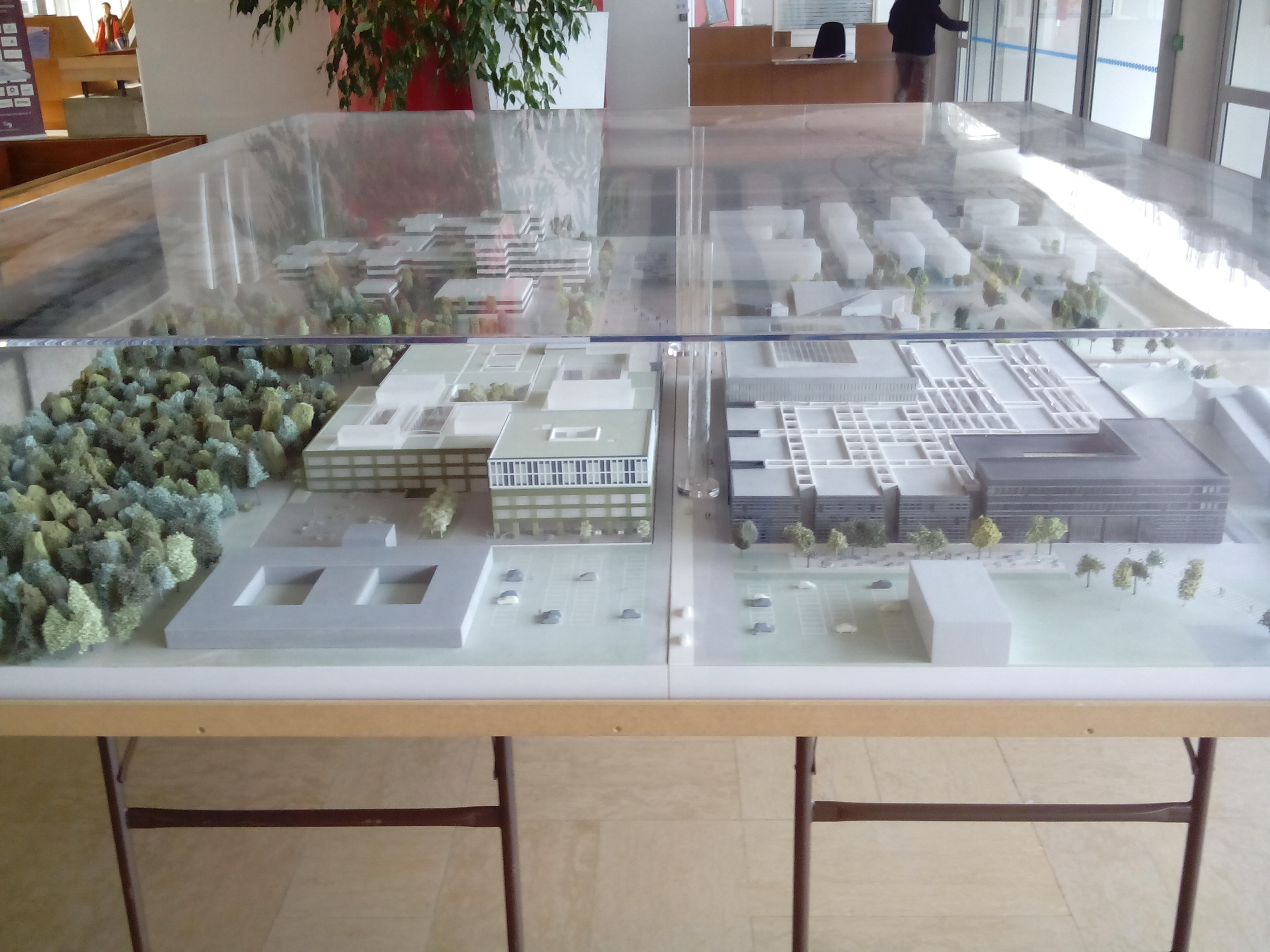 Maquette présentée à l'école centralesupélec, Châtenay, présentant le futur campus de Gif-sur-Yvette. Au fond à gauche, le bâtiment S (Supélec) existant, en avant-plan à droite, le bâtiment A, à gauche le bâtiment B. A gauche, la forêt communale de Gif-sur-Yvette